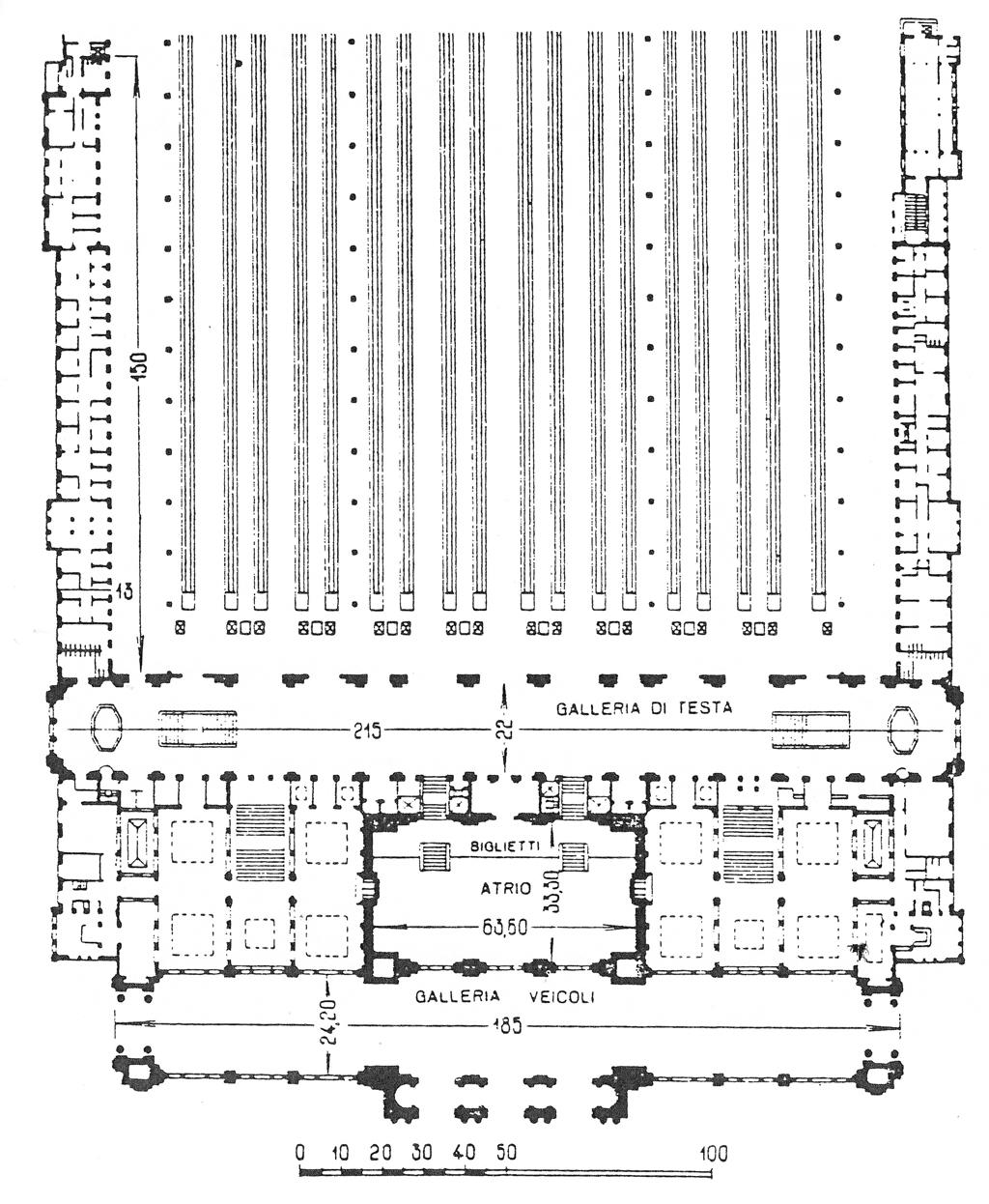 Stazione ferroviaria di Milano Centrale, pianta del fabbricato viaggiatori al piano dei binari